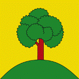 Flag of Goldingen, Canton of St. Gallen - Flago de Goldingen, Kantono de Sankt-Galo